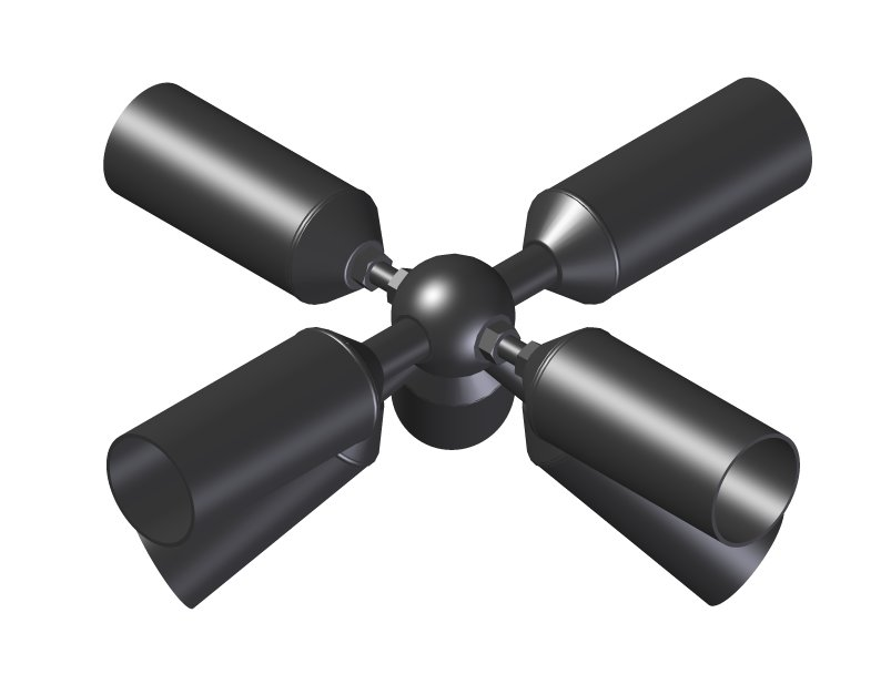 Barras de malla espacial confluyendo en Nudo Nuclos, desarrollado por Asteca Estructuras